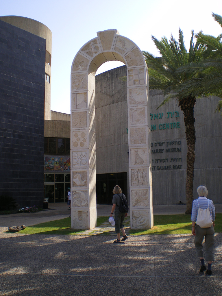 Yigal Allon Centre, Israel